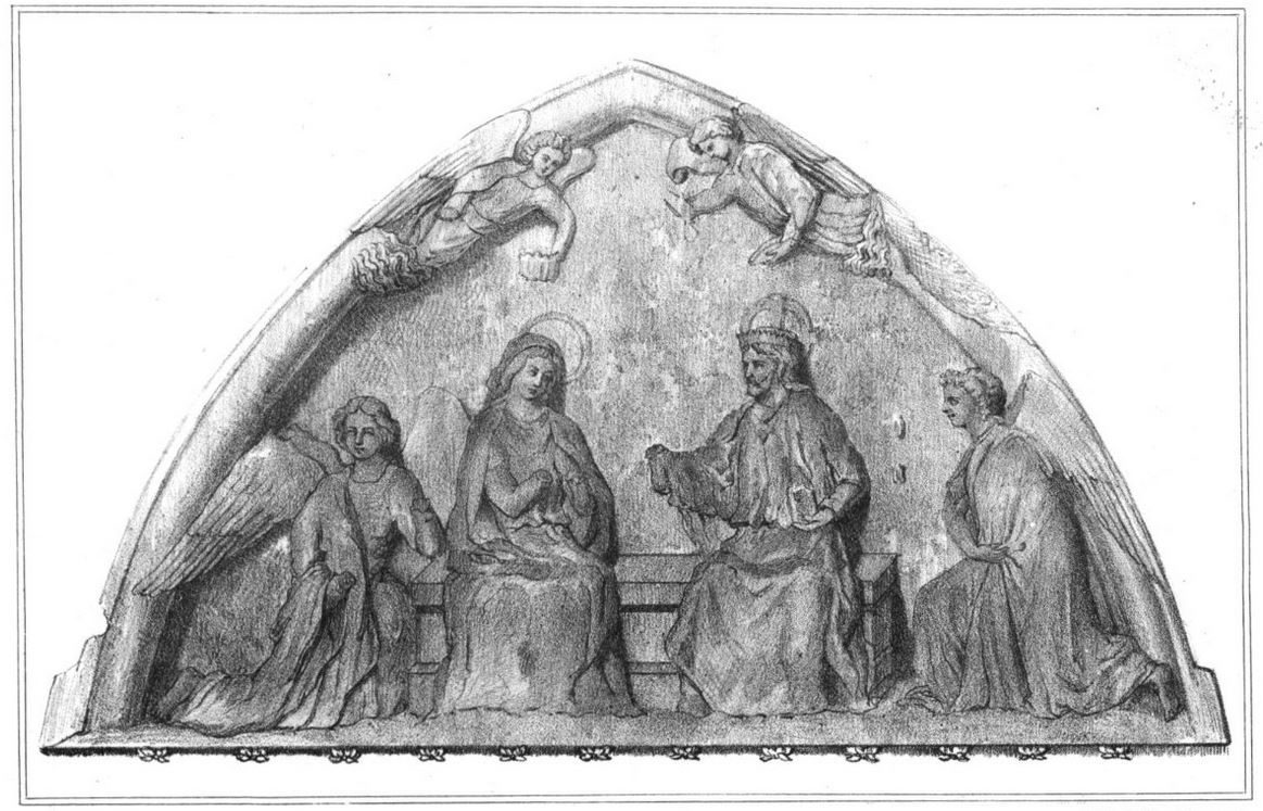 Tympan du XIIIe siècle de la commanderie de l'Hôpitau à Gérosdot (maintenant Géraudot).